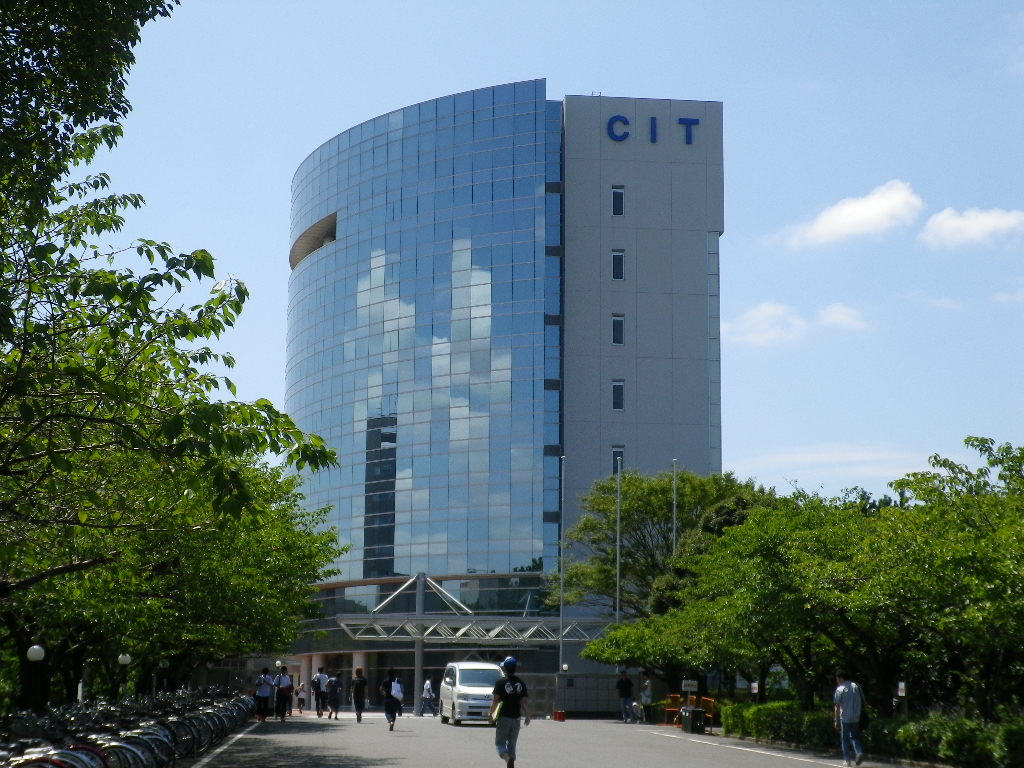 千葉工業大学芝園キャンパス